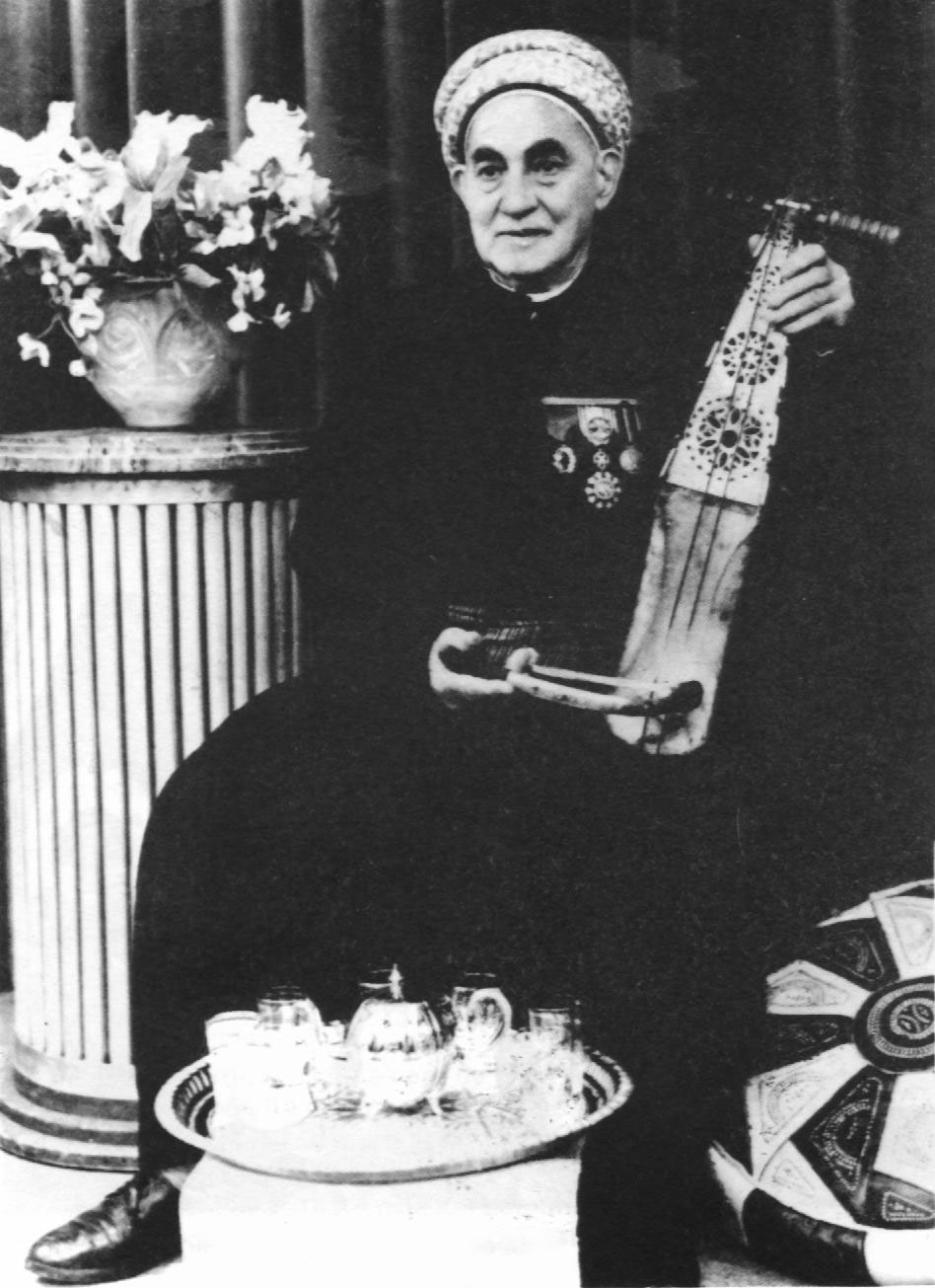 Le chanteur tlemcénien Hadj Larbi Bensari, virtuose du "Rbab".